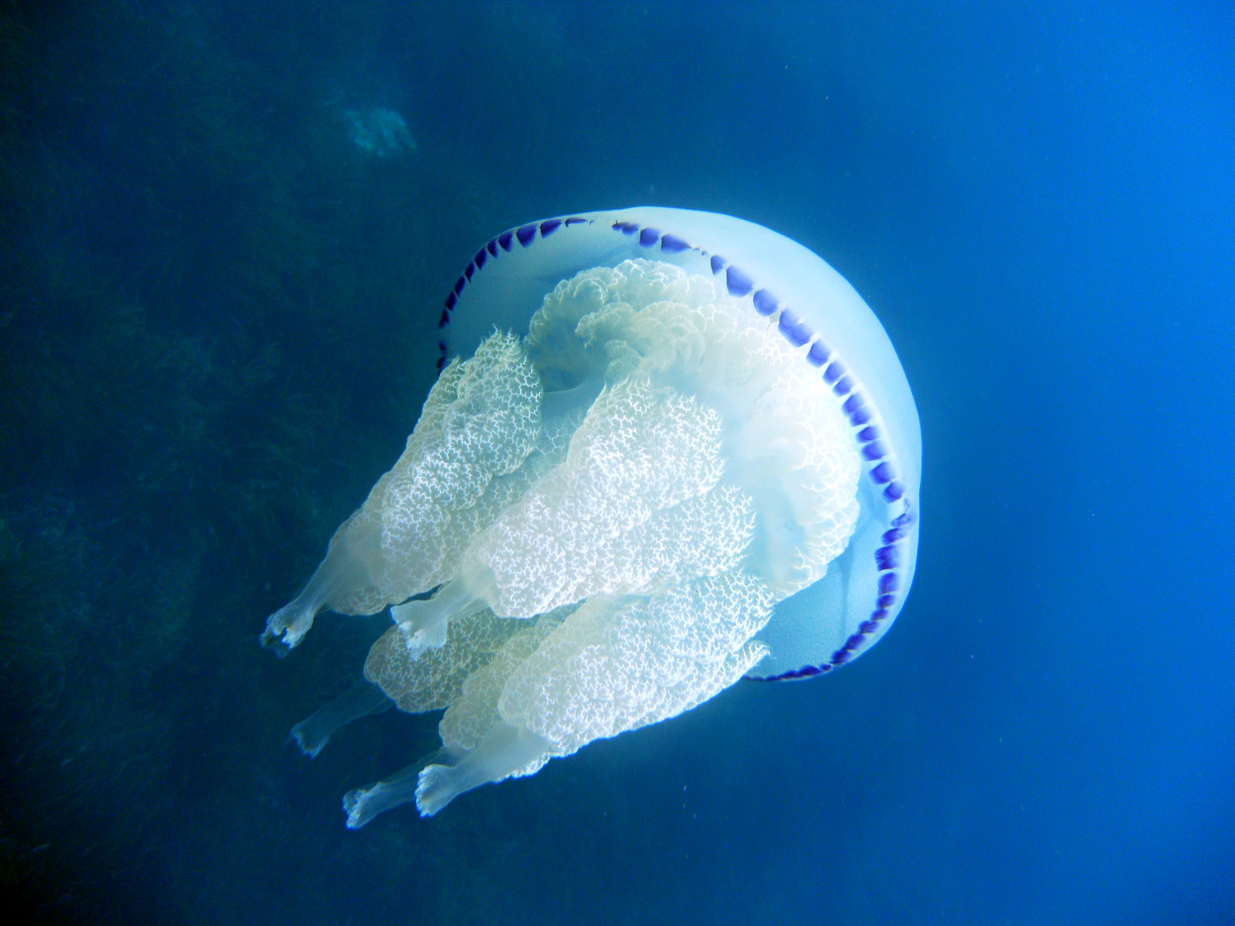 Rhizostoma pulmo Favignana, Sicily